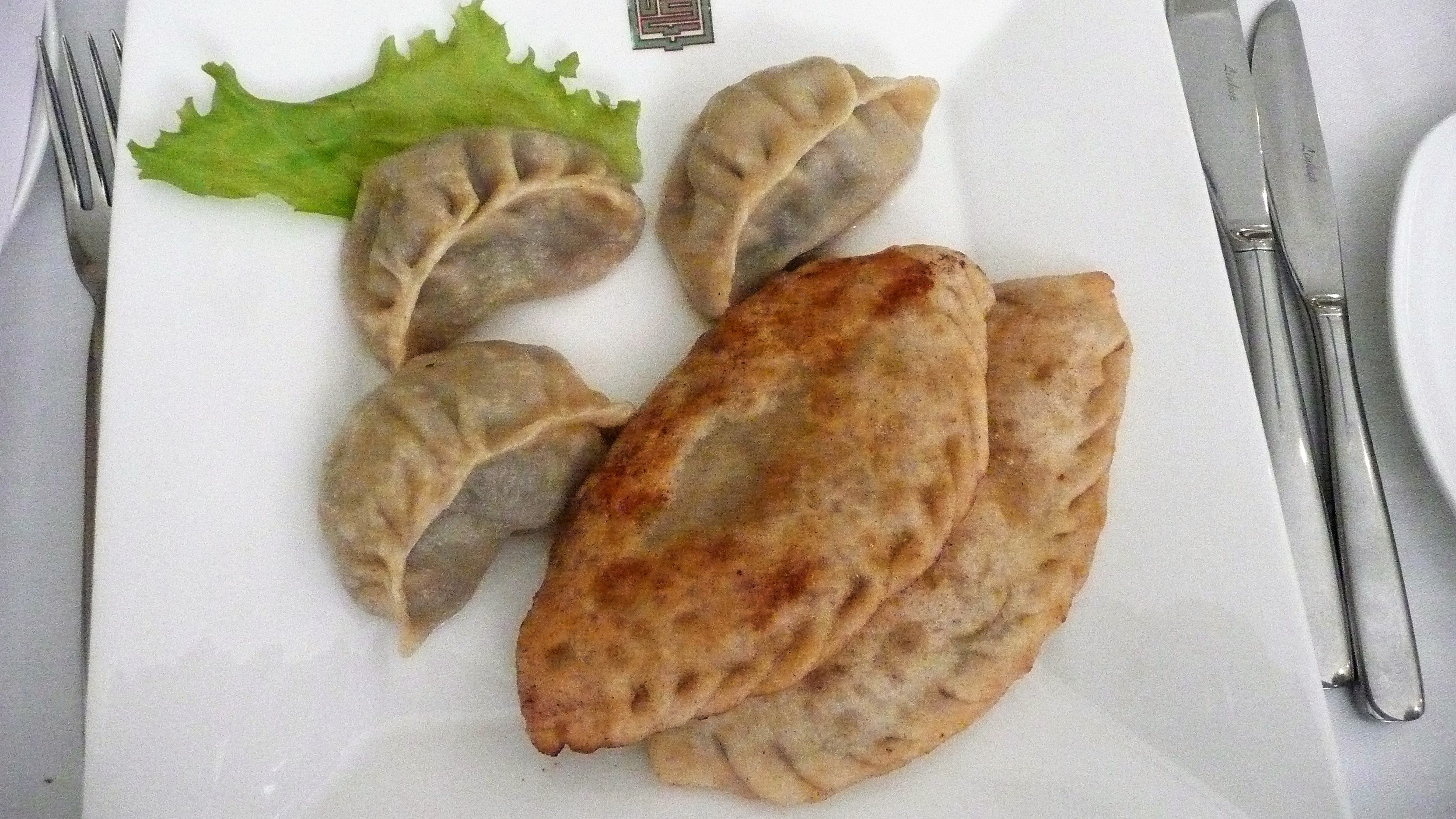 Mongolische Teigtaschen: Buuz und Chuuschuur